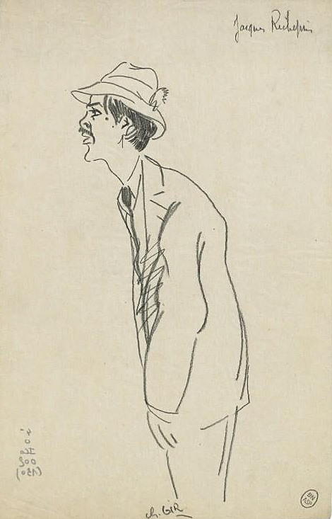 Jacques Richepin : portrait